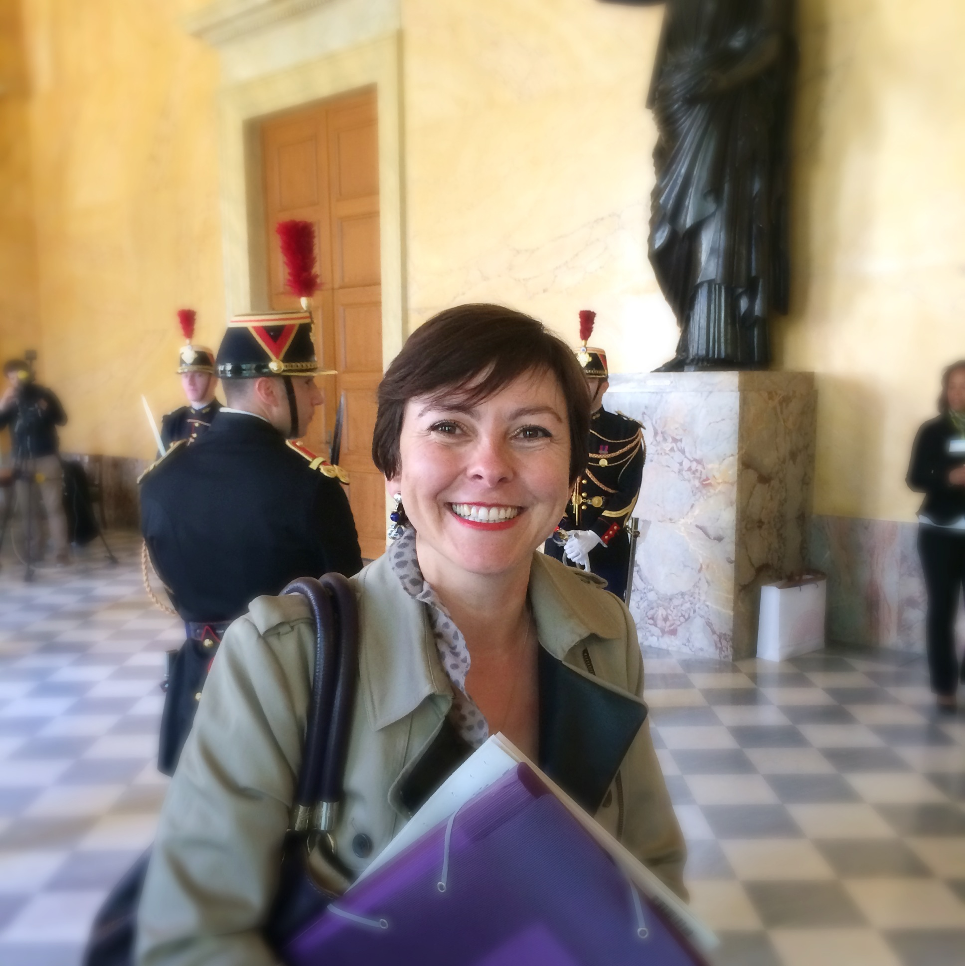 Carole Delga à l'AN.